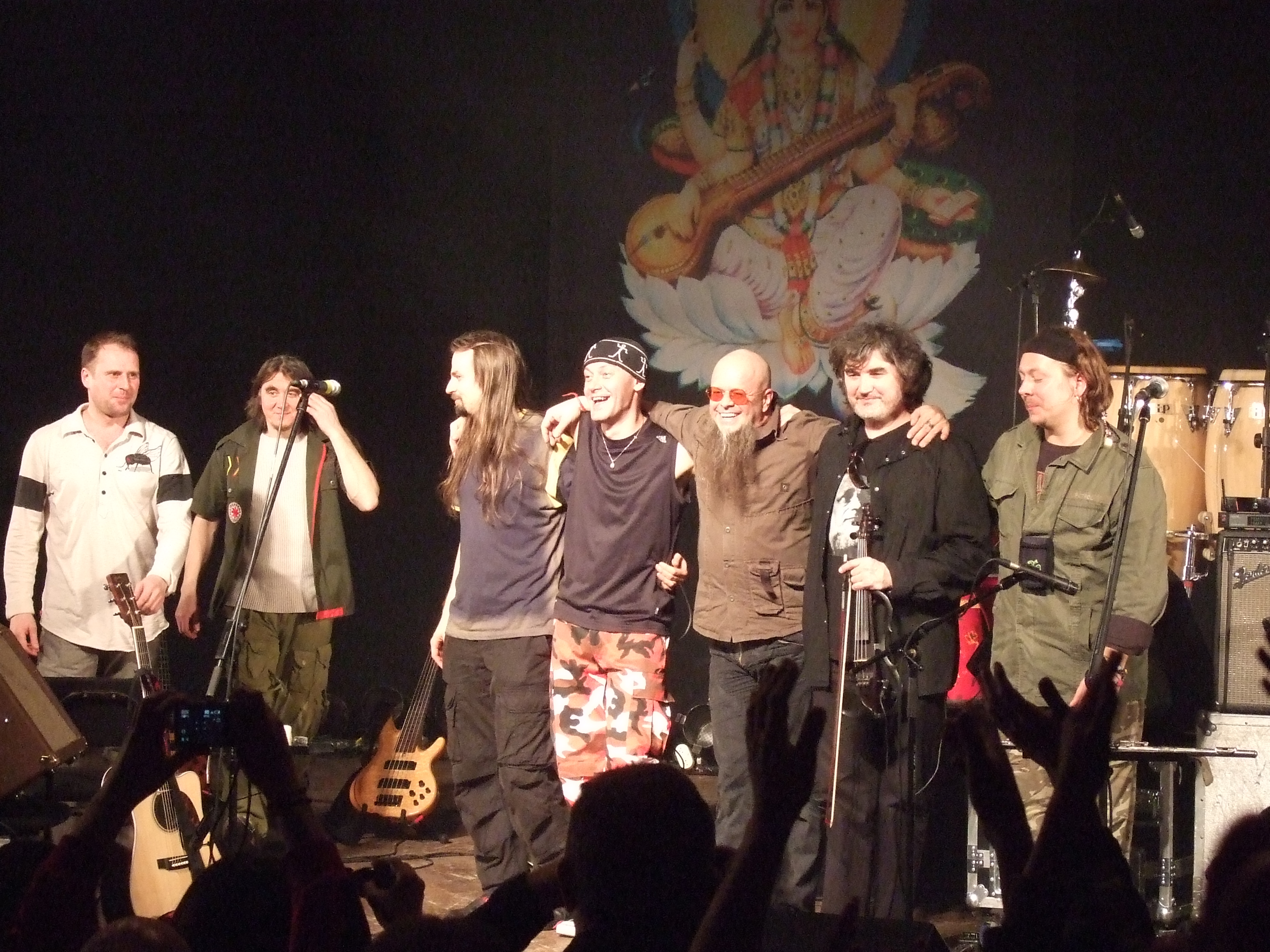 Aquarium concert, Tel Aviv, 2008